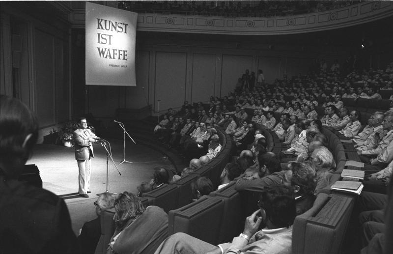 Berlin, Kulturkonferenz der NVA, Rede Konrad Wolf ADN-ZB/Senft/24.9.1981 Berlin: Kulturkonferenz Anläßlich der Kulturkonferenz der NVA und der Grenztruppen der DDR fand eine Veranstaltung "Zu Gast in der Akademie der Künste" statt. Zu den Teilnehmern sprach Konrad Wolf, Präsident der Akademie. [Berlin.- Kulturkonferenz der Nationalen Volksarmee und der Grenztruppen im Hörsaal der AdK, Rede von Konrad Wolf neben Transparent "Kunst ist Waffe. Friedrich Wolf"] Abgebildete Personen: Wolf, Konrad: Filmregisseur, Zentralkomitee (ZK) der SED, Präsident der Akademie der Künste, Bruder von Markus Wolf, DDR